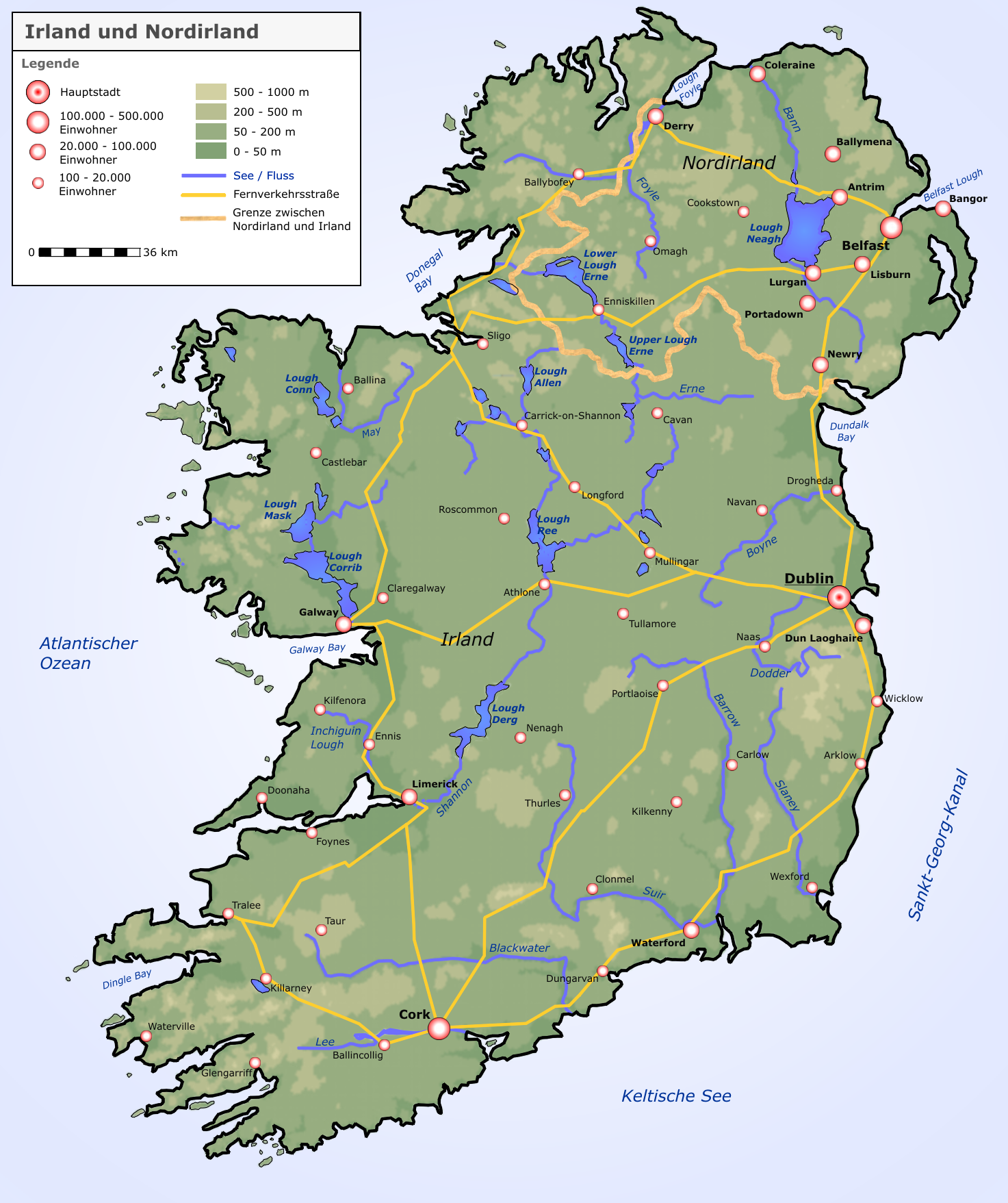 Neue Karte von Irland und Nordirland